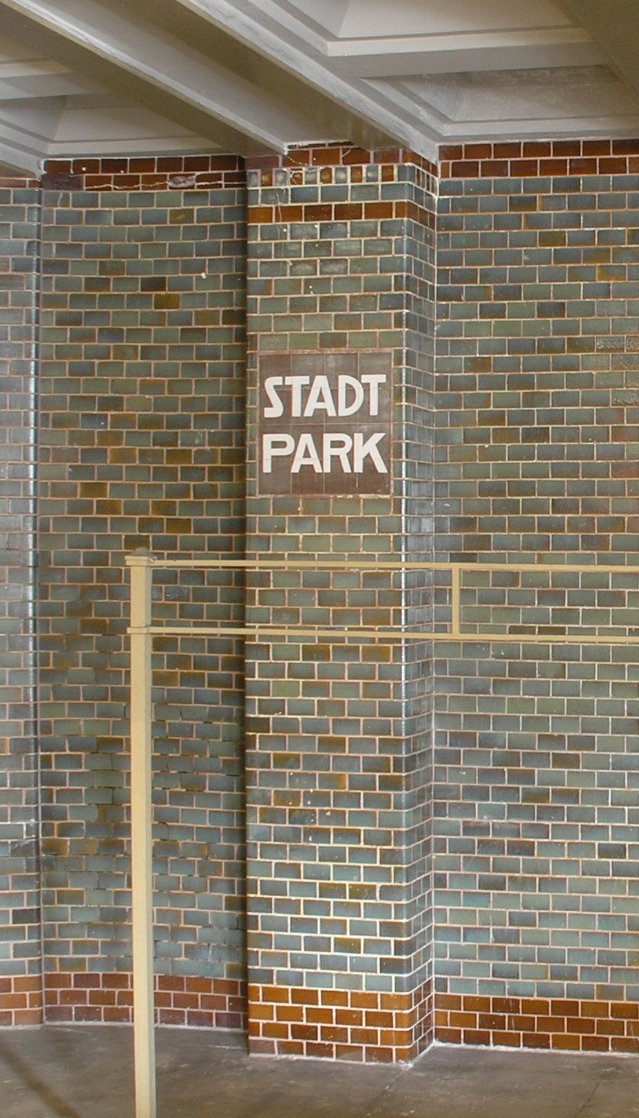 Berliner U-Bahnhof Rathaus Schöneberg, Blick auf den wandgefliesten Bereich nahe dem Eingang mit ursprünglicher Bezeichnung „Stadtpark“ (erbaut bis zum Jahr 1910, wiederhergestellt bis 1951)